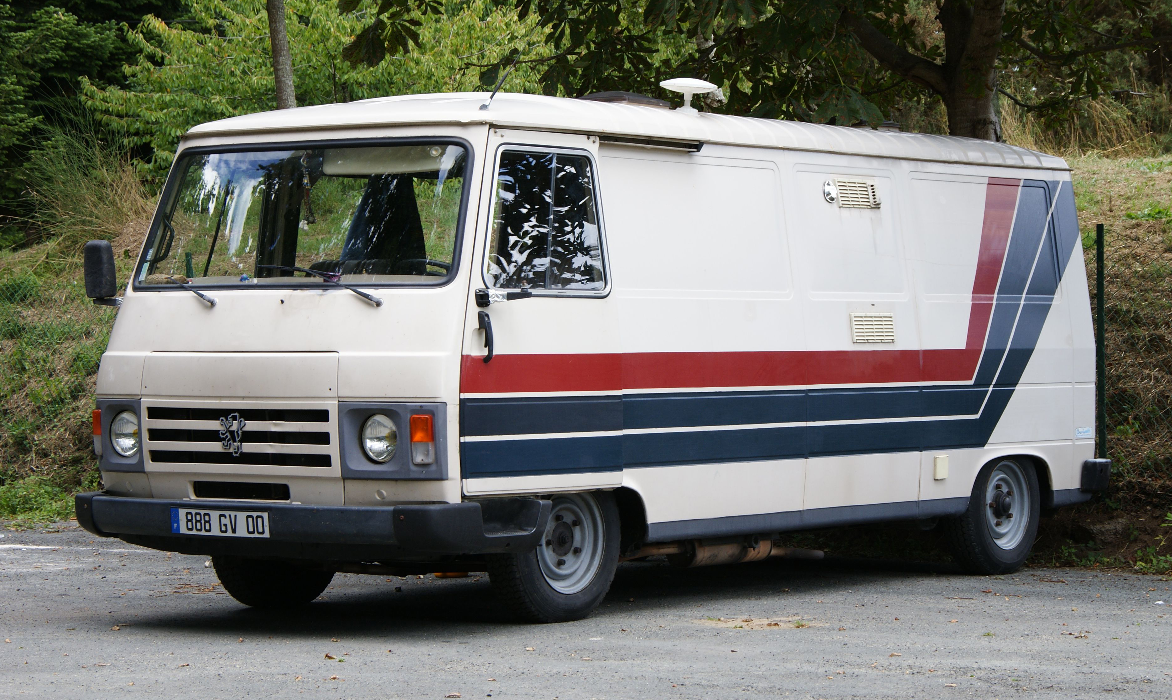 Peugeot J9